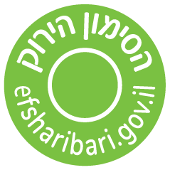 הסמל הירוק שיוצג על מוצרים שמשרד הבריאות יקבע כי הם בריאים (הסימון הינו רשות ואין חוק המחייב להציגו).